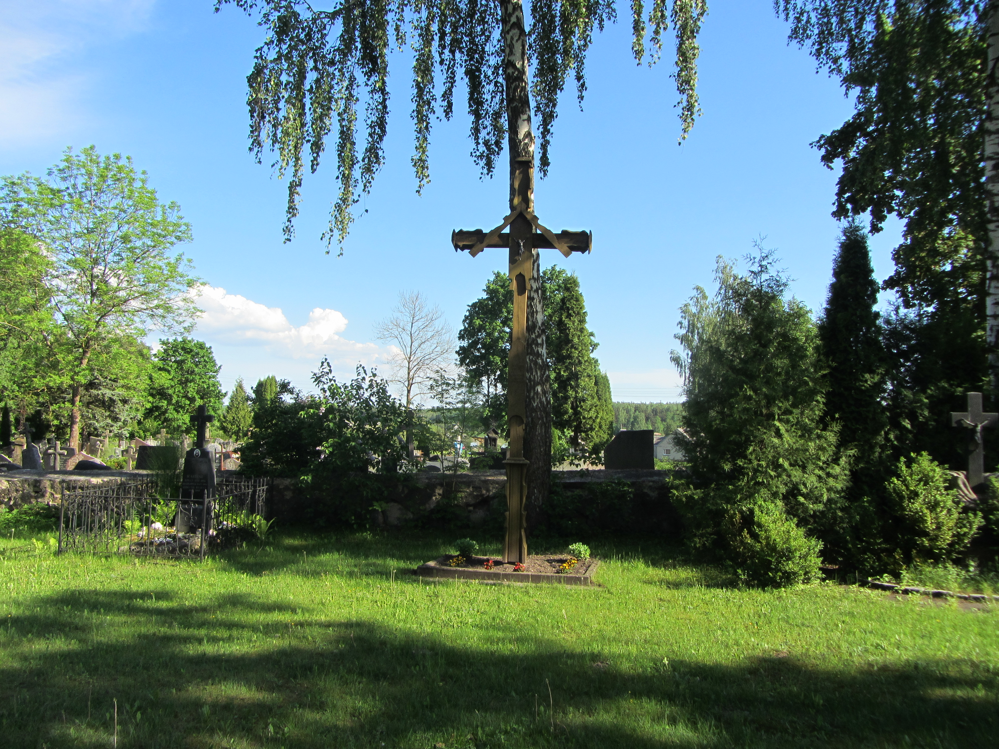 Suginčiai, Lithuania